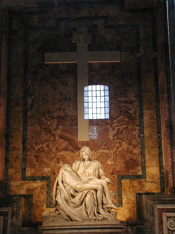 Bilder aus Rom